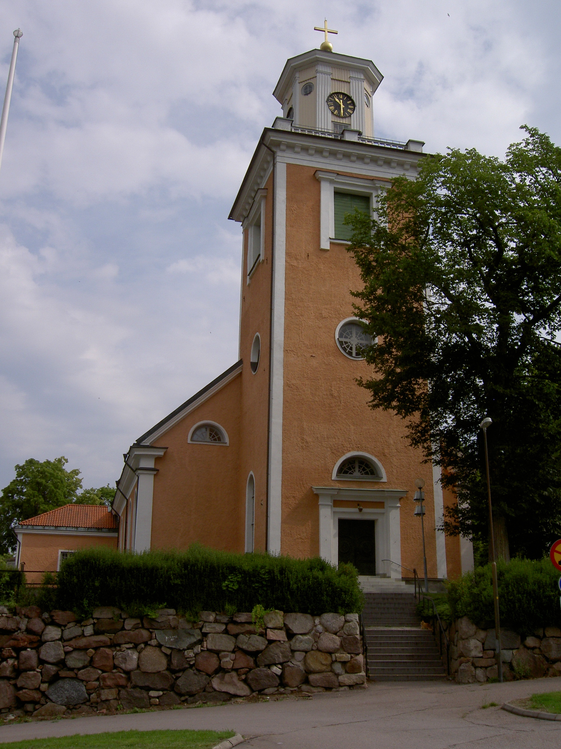 Mönsterås kyrka